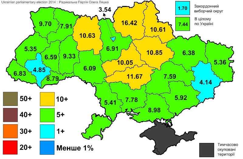 Результати виборів до Верховної Ради України, які відбулись 25 жовтня 2014 року. Інформація з офіційного сайту ЦВК. Радикальна Партія Олега Ляшка.